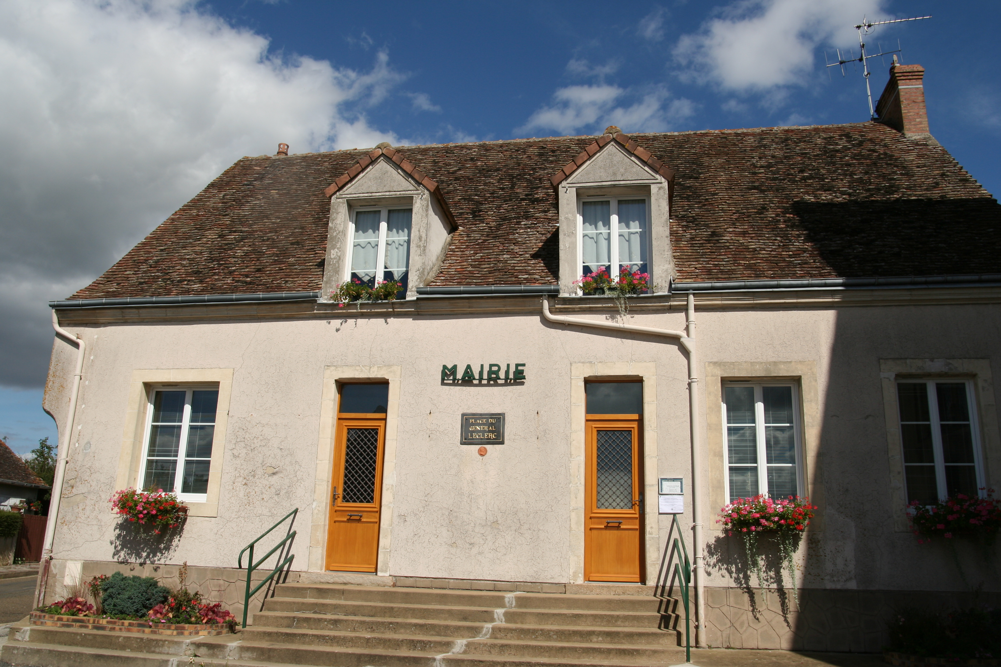 La mairie de Mézières-sur-Ponthouin.